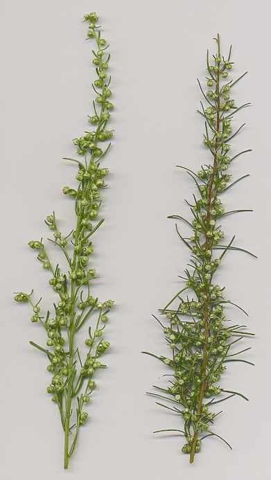 Õitsev sidrunpuju